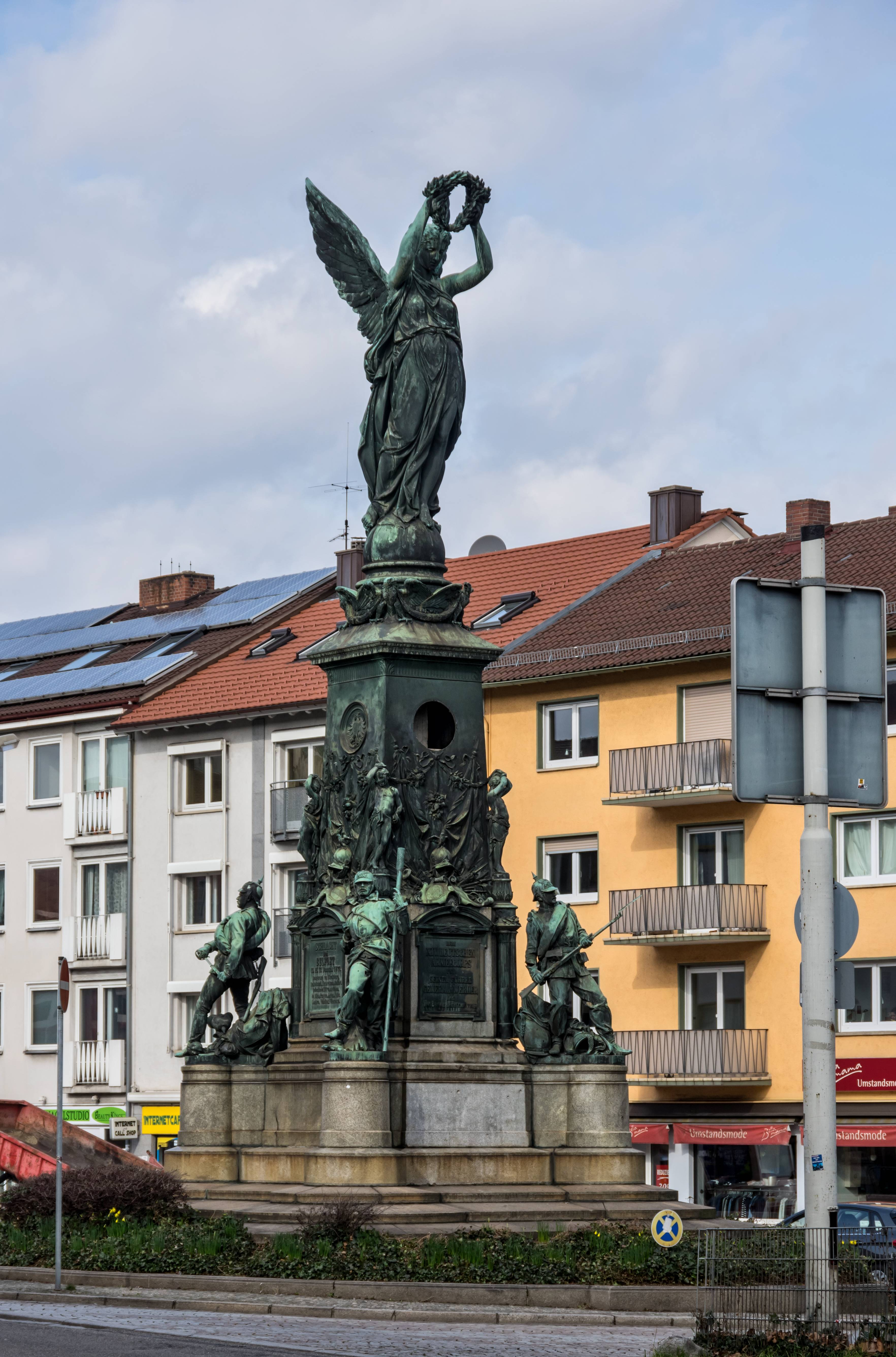 Bilder aus Freiburg